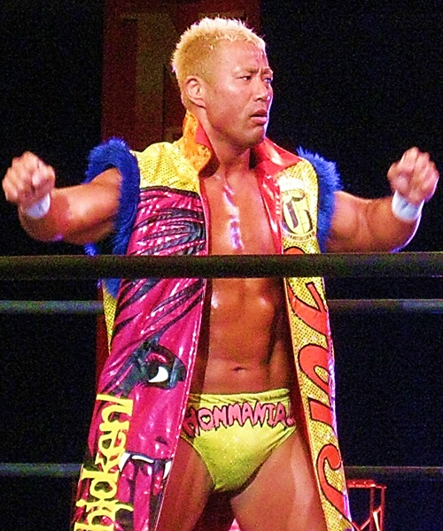 2015年3月22日 ベイコム総合体育館「Road to INVASION ATTACK 2015」本間朋晃